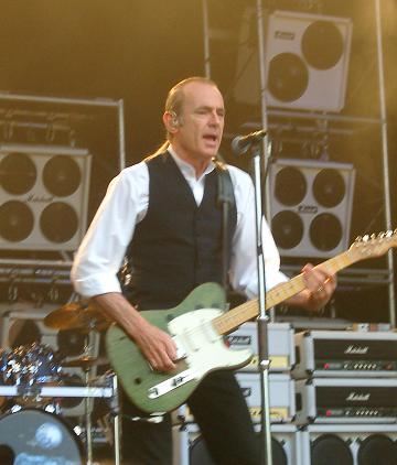 Francis Rossi in Huttwil (2005). Foto; Schmied/Plavsic (CH)